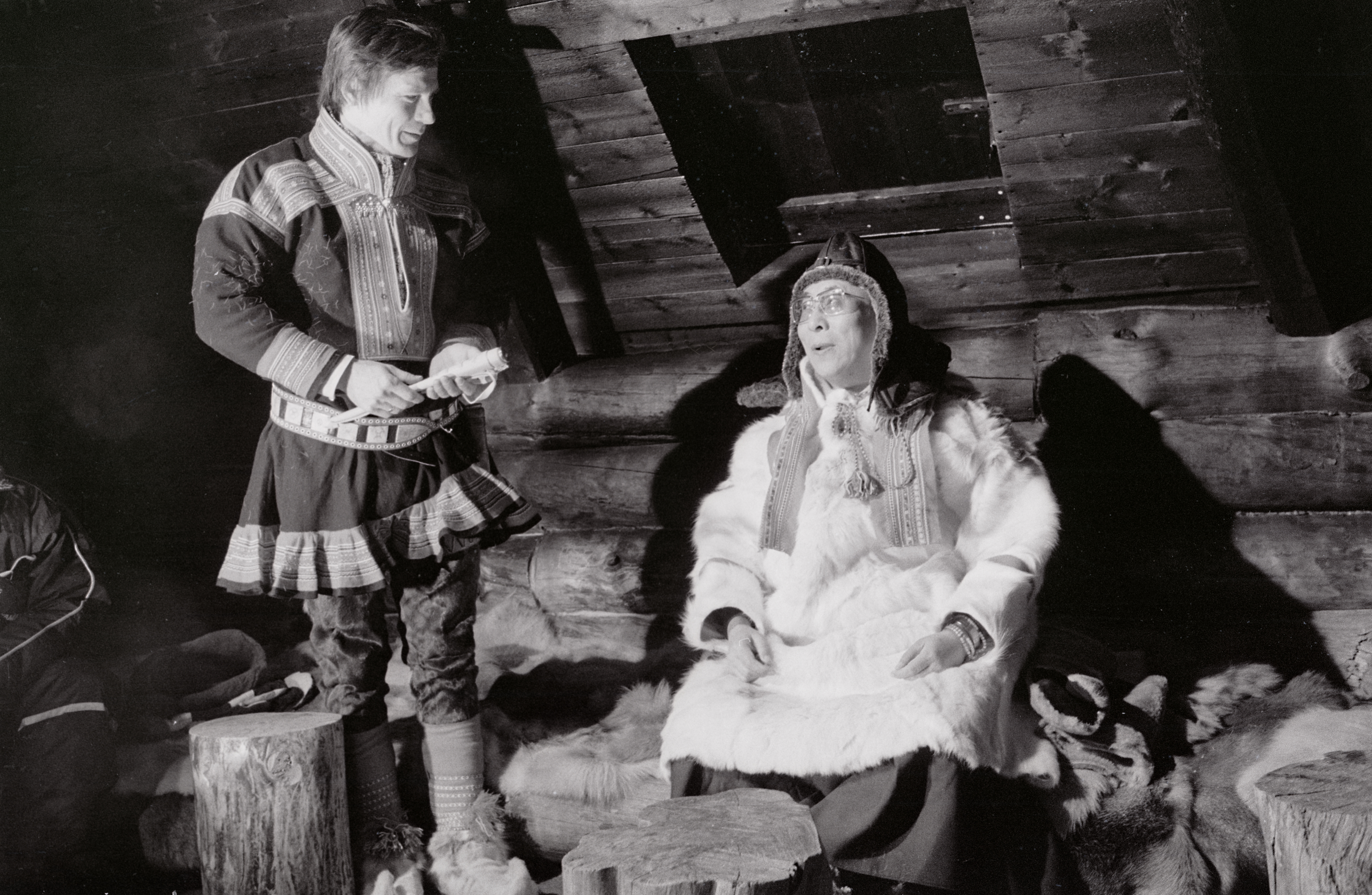 Den 14. Dalai Lama besøkte Sametinget og Karasjok i 1989 i forbindelse med sitt besøk i Norge i forbindelse med at han vant Nobels fredspris. Foto: Harry johansen.